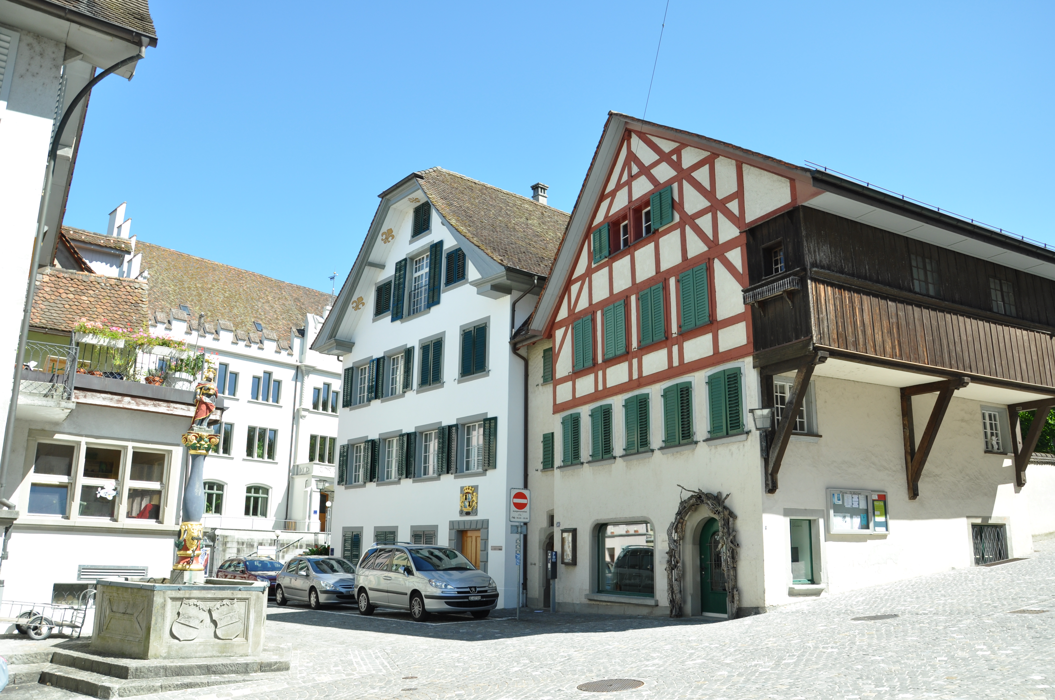 Pfarrbibliothek St. Michael Pfrundhaus St. Konrad